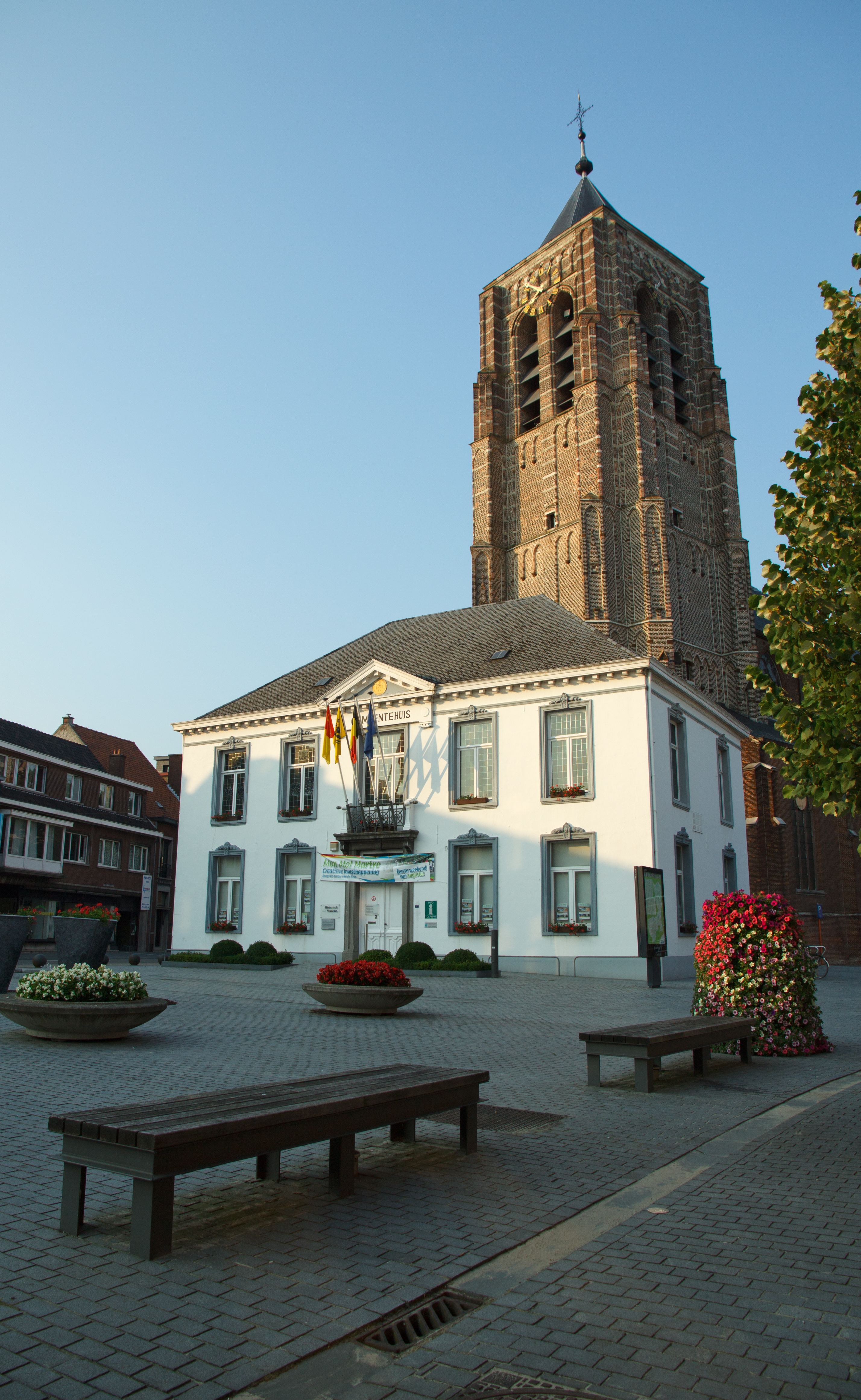 Het oude gemeentehuis doet nu dienst als VVV-kantoor. De bovenverdieping wordt gebruikt als tentoonstellingsruimte en als historisch museum door de Molse Kamer voor Heemkunde.